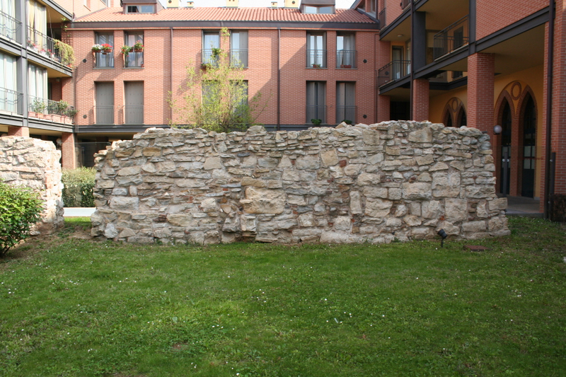 Resti delle Muraine veneziane a Bergamo, in via Previtali.